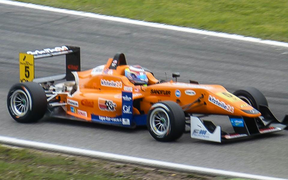 Formel 3 Dallara F312 beim DTM Auftakt 2013 in Hockenheim